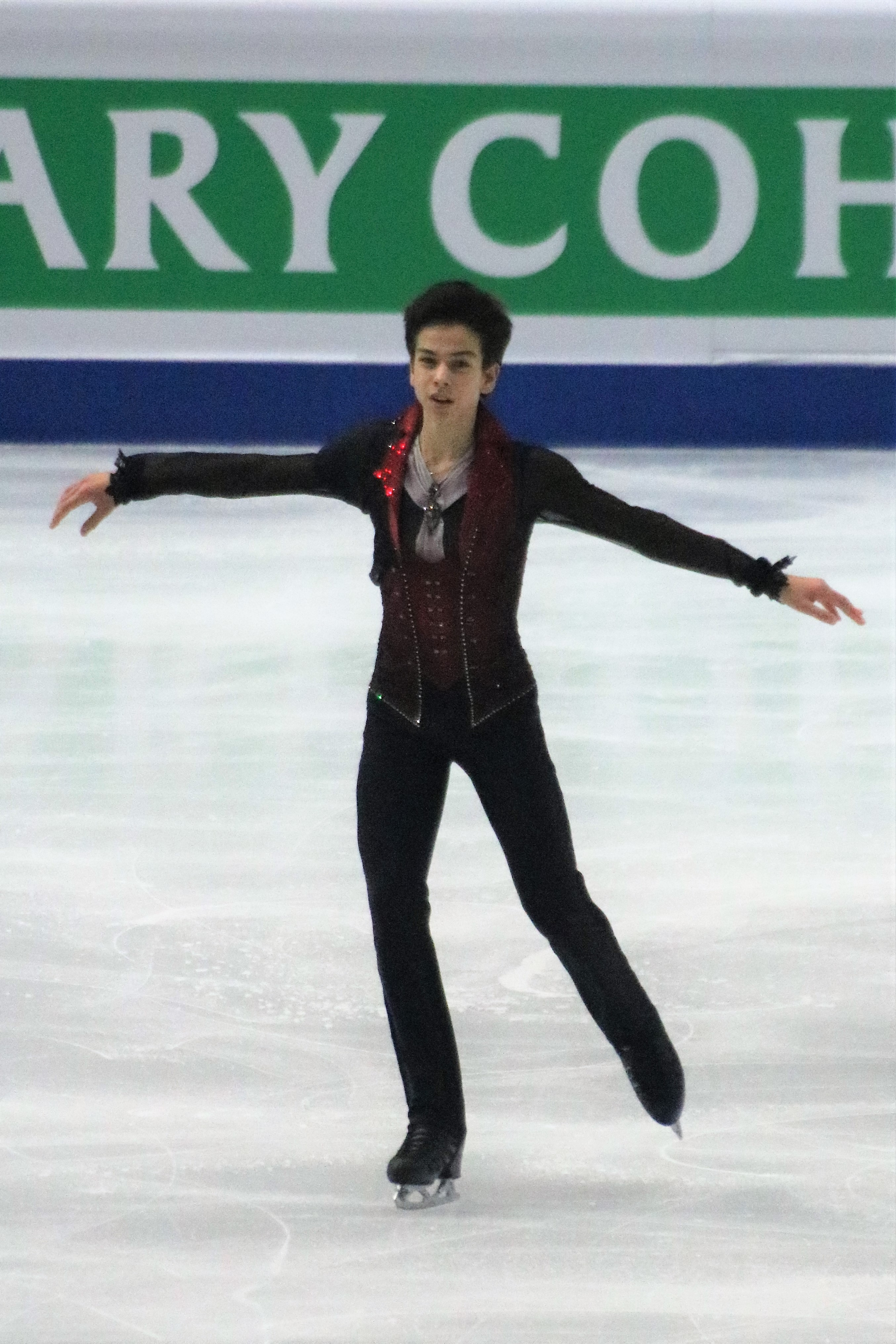 Пётр Гуменник (Россия) на финале юниорского Гран-при 2019-2020